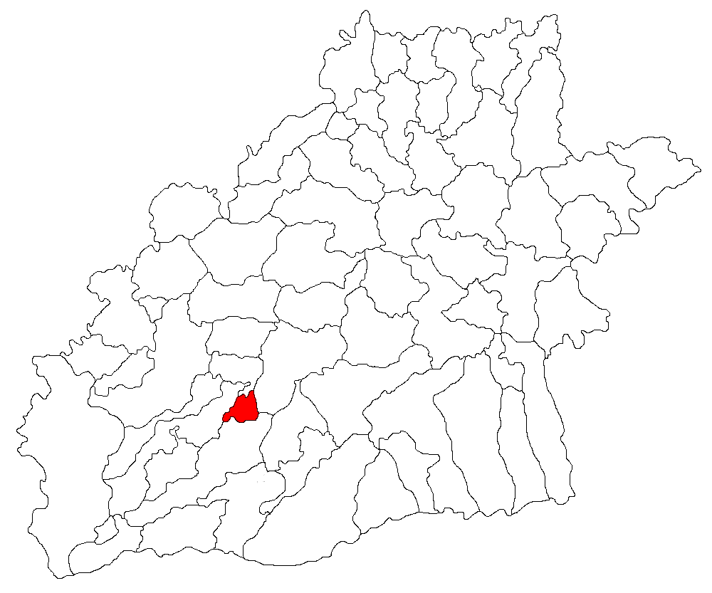 Categorie:Hărţi ale judeţului Sibiu